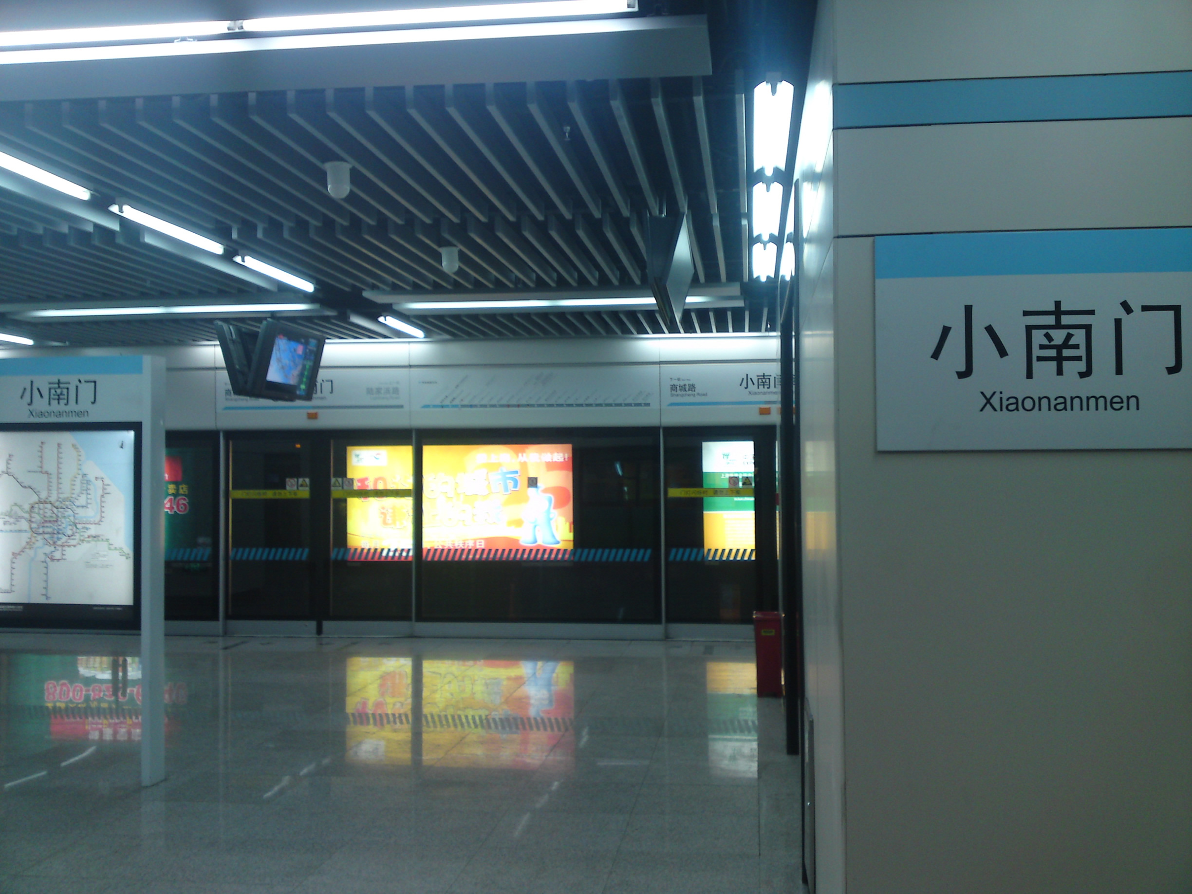 小南门站站台